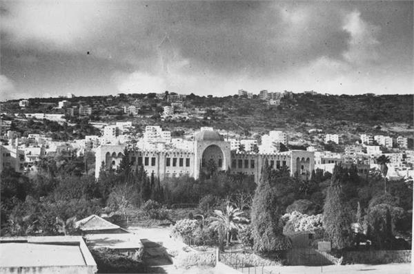 הטכניון בחיפה